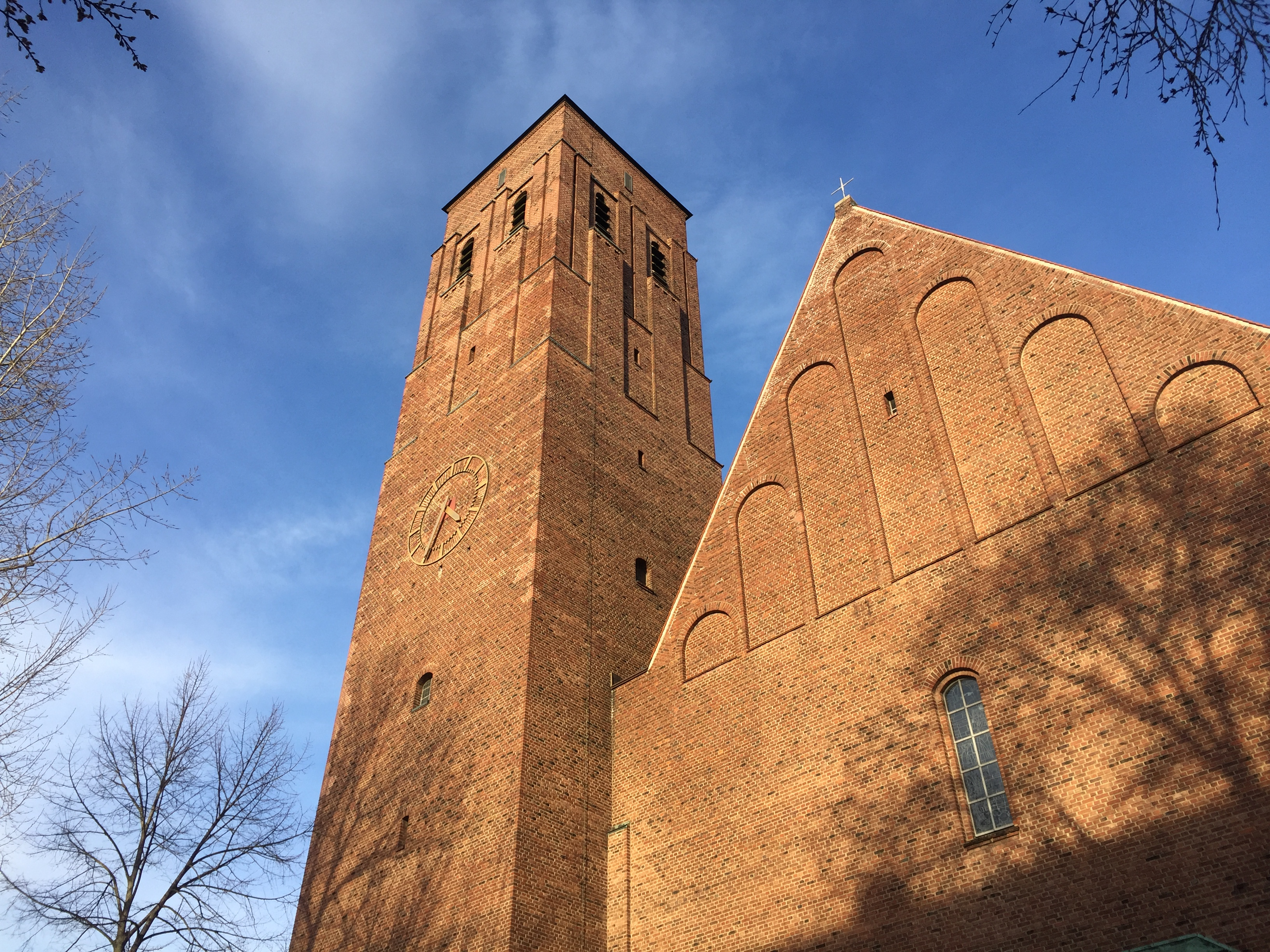 Die Kirche St. Elisabeth in Augsburg-Lechhausen, Westfassade mit Turm